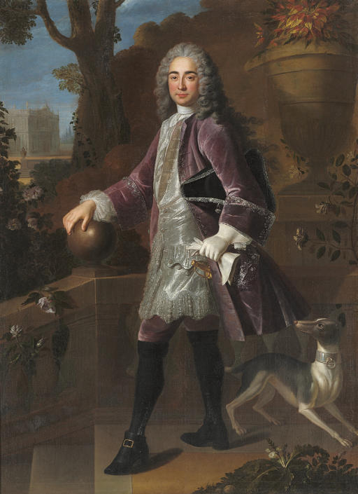 Portrait of Elie de Beaumont